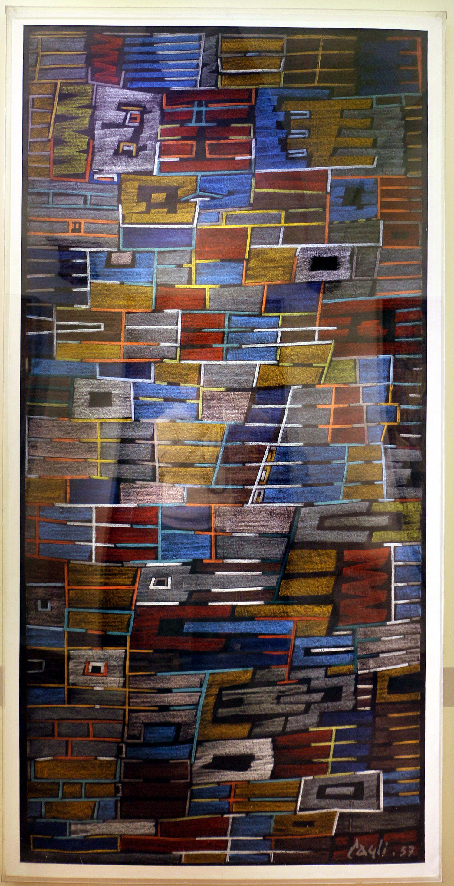 Collezione Mosaici Moderni - NB: Museum explicitly authorized the upload of its contemporary art collection for WLM 2016 (for further info ask WLM Italy organizators). This is a photo of a monument which is part of cultural heritage of Italy.